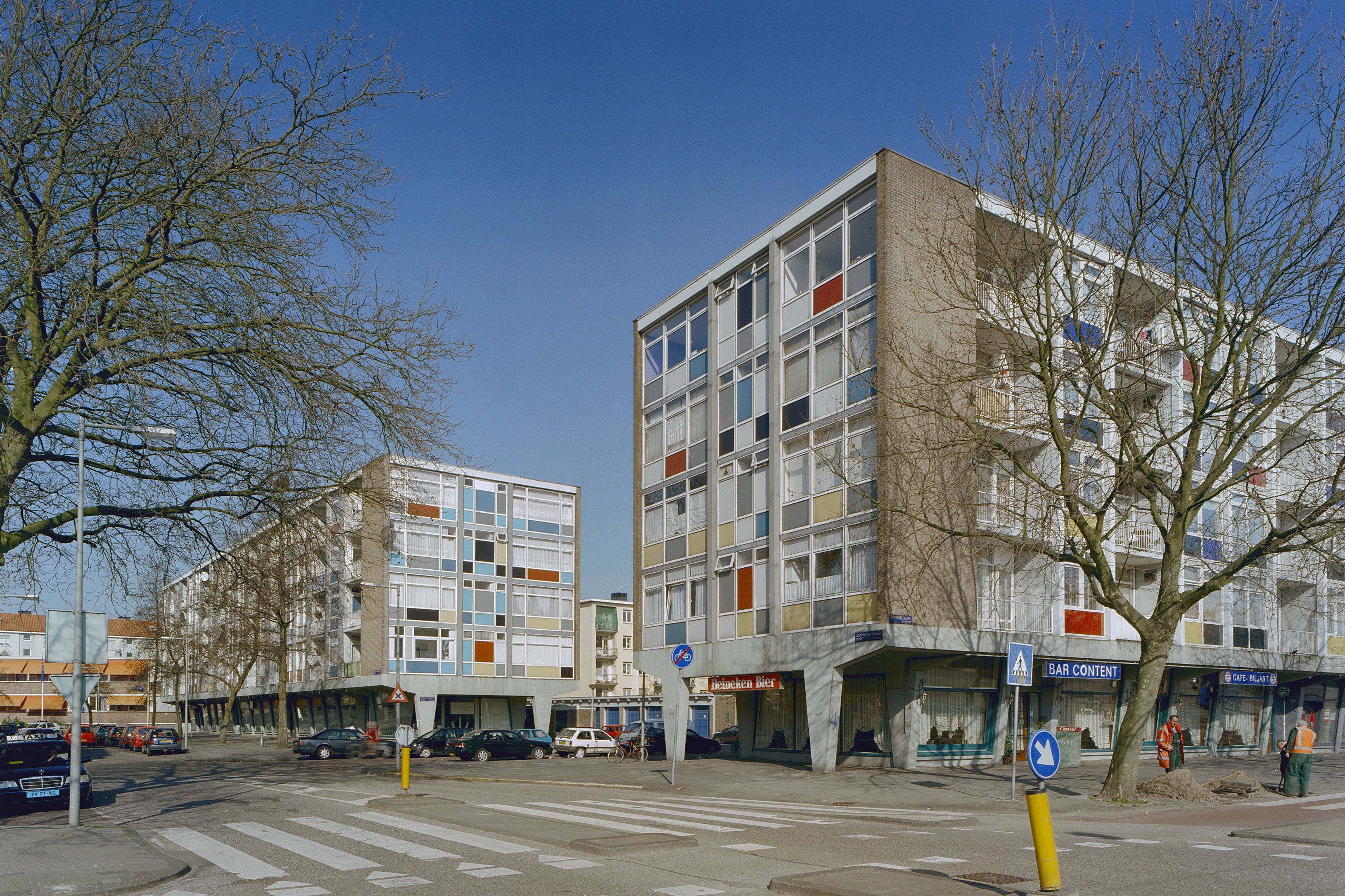 Tuinstad Slotermeer: Overzicht vanaf kruising (opmerking: Gefotografeerd voor Monumenten van Herrezen Nederland)